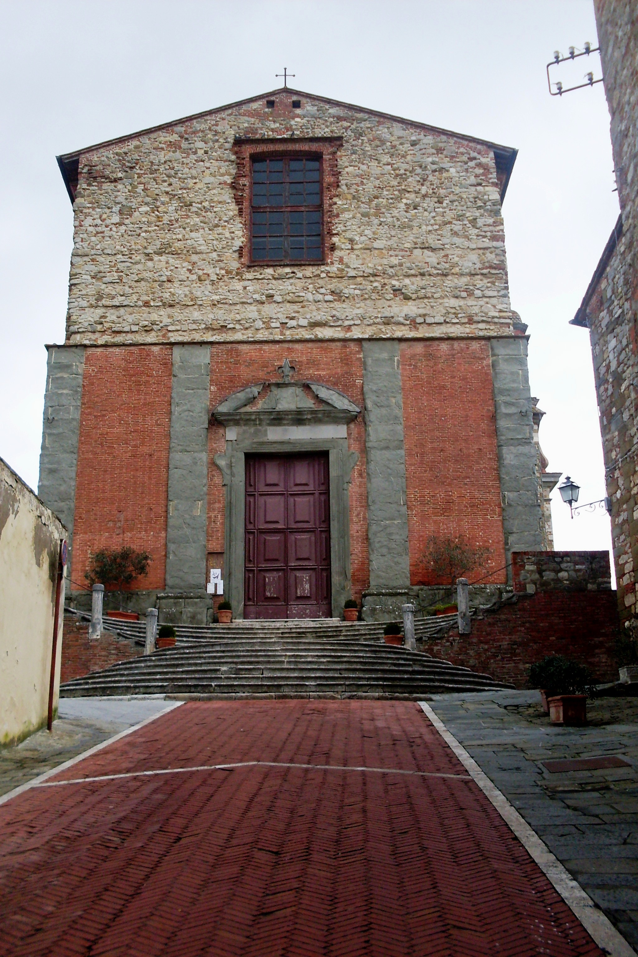 Centro storico This is a photo of a monument which is part of cultural heritage of Italy.